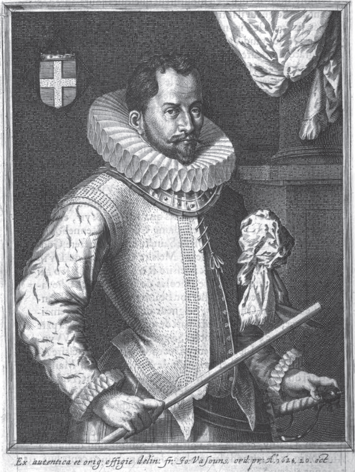 Herman de Lynden. Annales généalogiques de la Maison de Lynden. Christophe Butkens. Anvers, 1626.